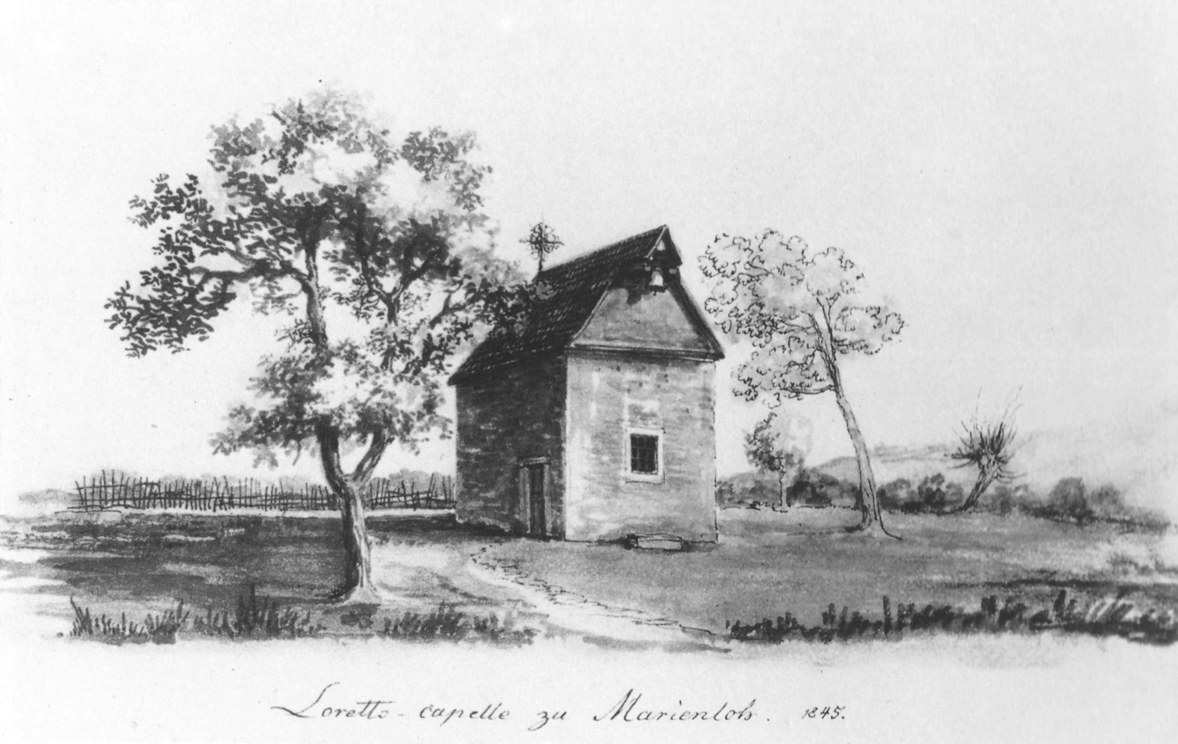 Loreto-Kapelle auf dem Gehöft Meyer, genannt Kloken, heutige Adresse: Detmolder Straße 426, 33104 Paderborn-Marienloh, erbaut 1678-1680, abgebrochen 1855, Zeichnung von Franz Josef Brand